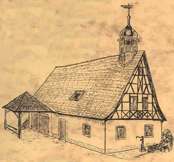 Zeichnung Glockenturm Abtsgreuth